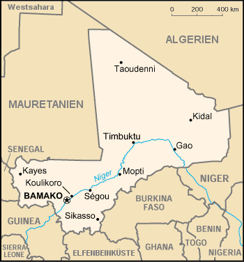 Karte von Mali - aus dem CIA World Factbook